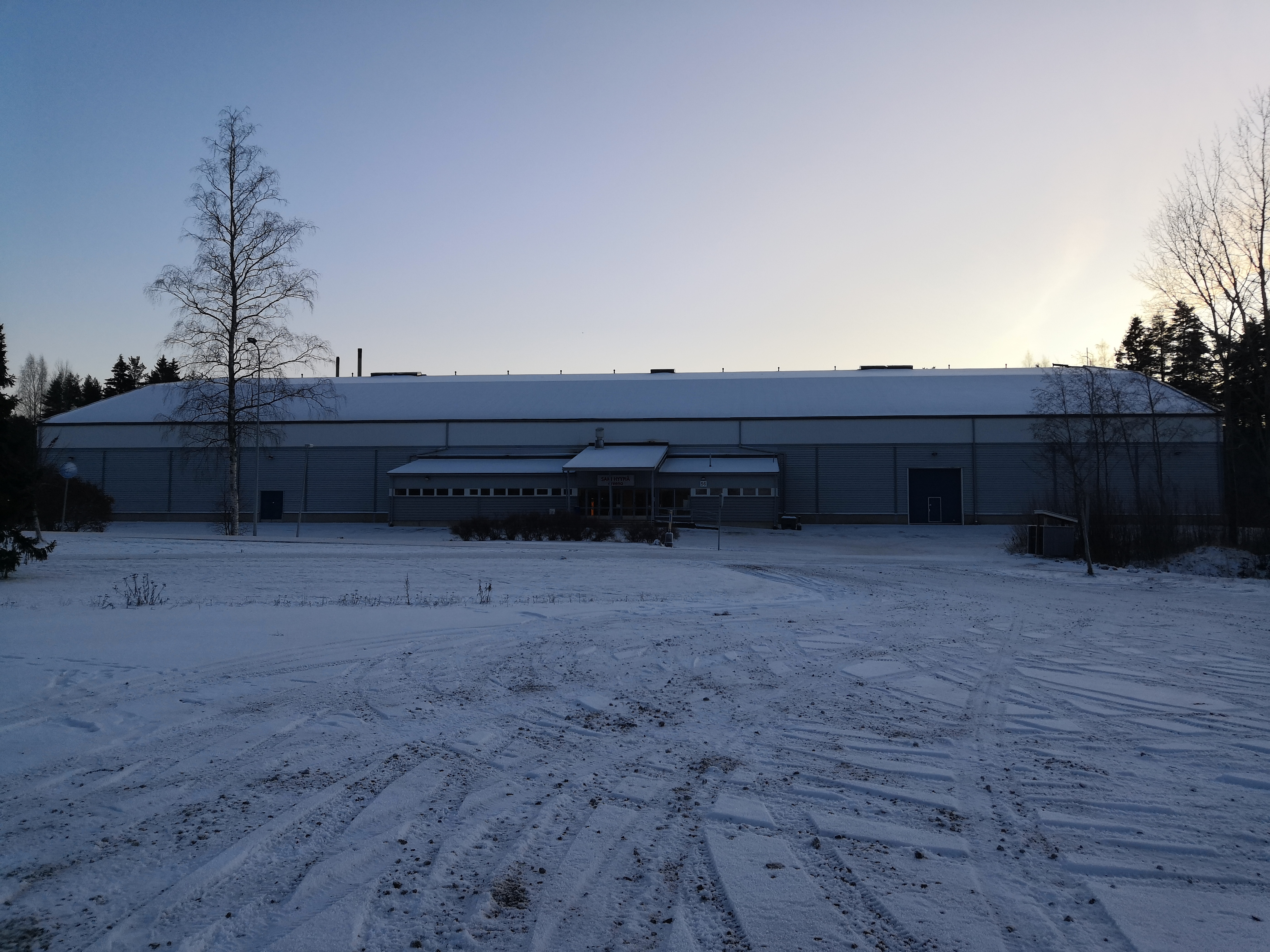 Sami Hyypiä Areena Kuusankoskella